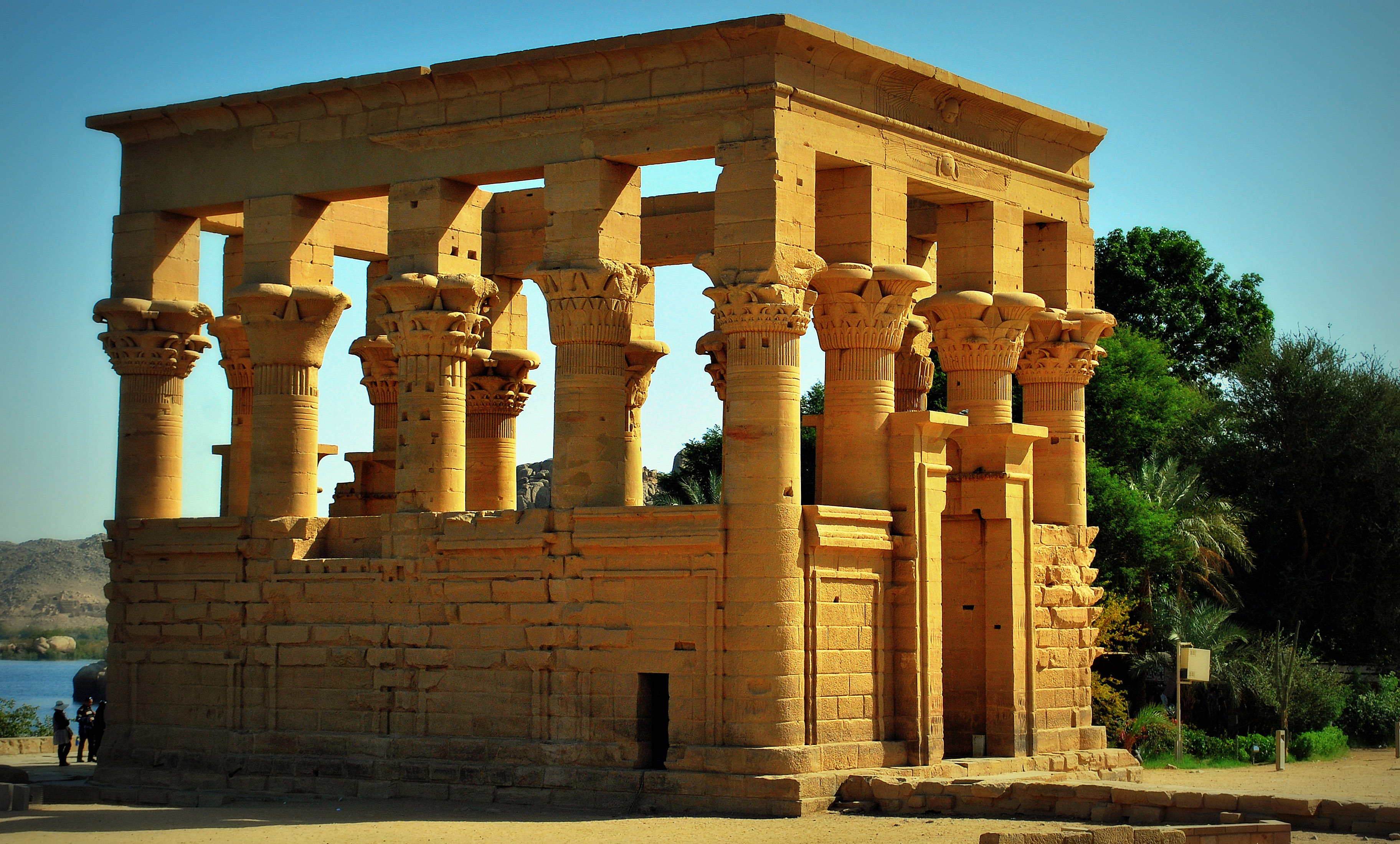 جزيرة فيلة، هي جزيرة في منتصف نهر النيل وهي إحدى الحصون الأقوى على طول حدود مصر الجنوبية، وتفصل النيل إلى قناتين معاكستين في أسوان، كان بها معبد فيلة وانتقل من مكانه الأصلي على جزيرة فيلة وتم تجميعه على جزيرة أجيليكا، وذلك في أعقاب بناء السد العالي. ويرجع اسم فيلة أو فيلاي إلى اللغة الإغريقية التي تعني (الحبيبة) أو (الحبيبات) أما الاسم العربي لها فهو أنس الوجود نسبة لأسطورة أنس الموجودة في قصص ألف ليلة وليلة أما الاسم المصري القديم والقبطي فهو بيلاك أو بيلاخ ويعني الحد أو النهاية لأنها كانت آخر حدود مصر في الجنوب. ومجموعة العبادة كرست لعبادة الإلهة إيزيس غير أن الجزيرة احتوت على معابد لحتحور وأمنحتب وغيرها من المعابد. معبد فيلة هذا المعبد المخصص للإلهة أيزيس والذي أغرقته مياه النيل وتم تقسيمه وأعيد تجميعه في موقع جديد فوق جزيرة إجيليكا على بعد حوالي 500م من مكانه الأصلي بجزيرة فيلة ويضم مبانيه معبداً لحتحور ويمكن للزائر مشاهدة عرض الصوت والضوء ليلاً الذي يقدم بلغات مختلفة. كانت مصر جزءا مزدهرا من أجزاء الإمبراطورية الرومانية، أصبحت ثرية بحق وقد بنيت فيها عدة مدن جديدة ومن أشهر المنشآت في مصر في العصر الروماني ما يسمي مضجع فرعون أي كشك تراجان وهذا الأثر بناه في جزيرة فيلة تراجان الحاكم الروماني.